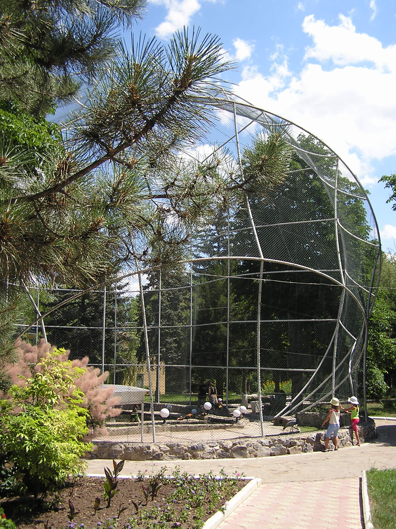 Зоопарк в Докучаевске This pfotography taken in Dokuchaevsk ZOO Note: ZOO co-ordinates is